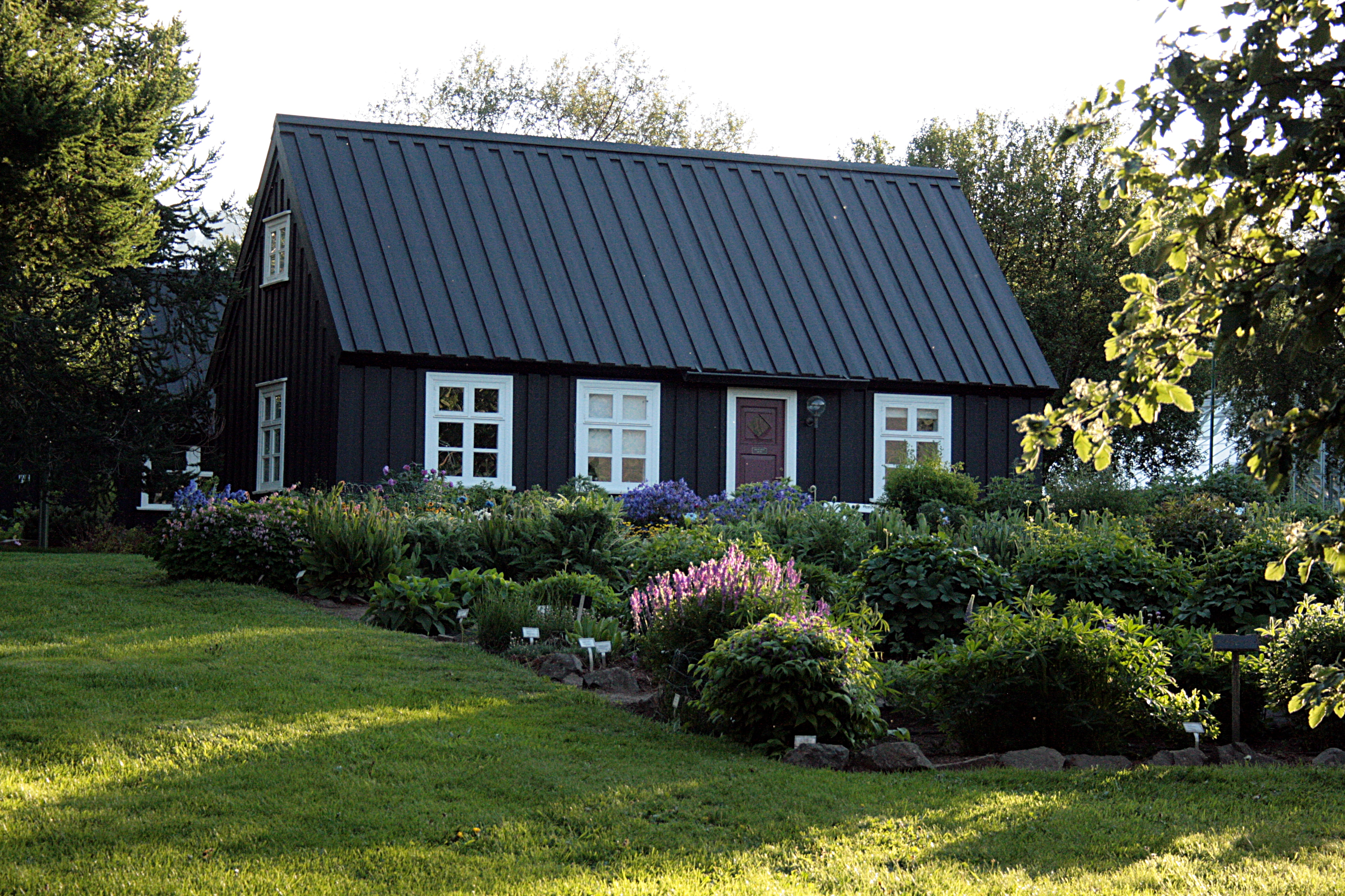 Ísland, Akureyri Botanical Gardens: Eyrarlandsstofa